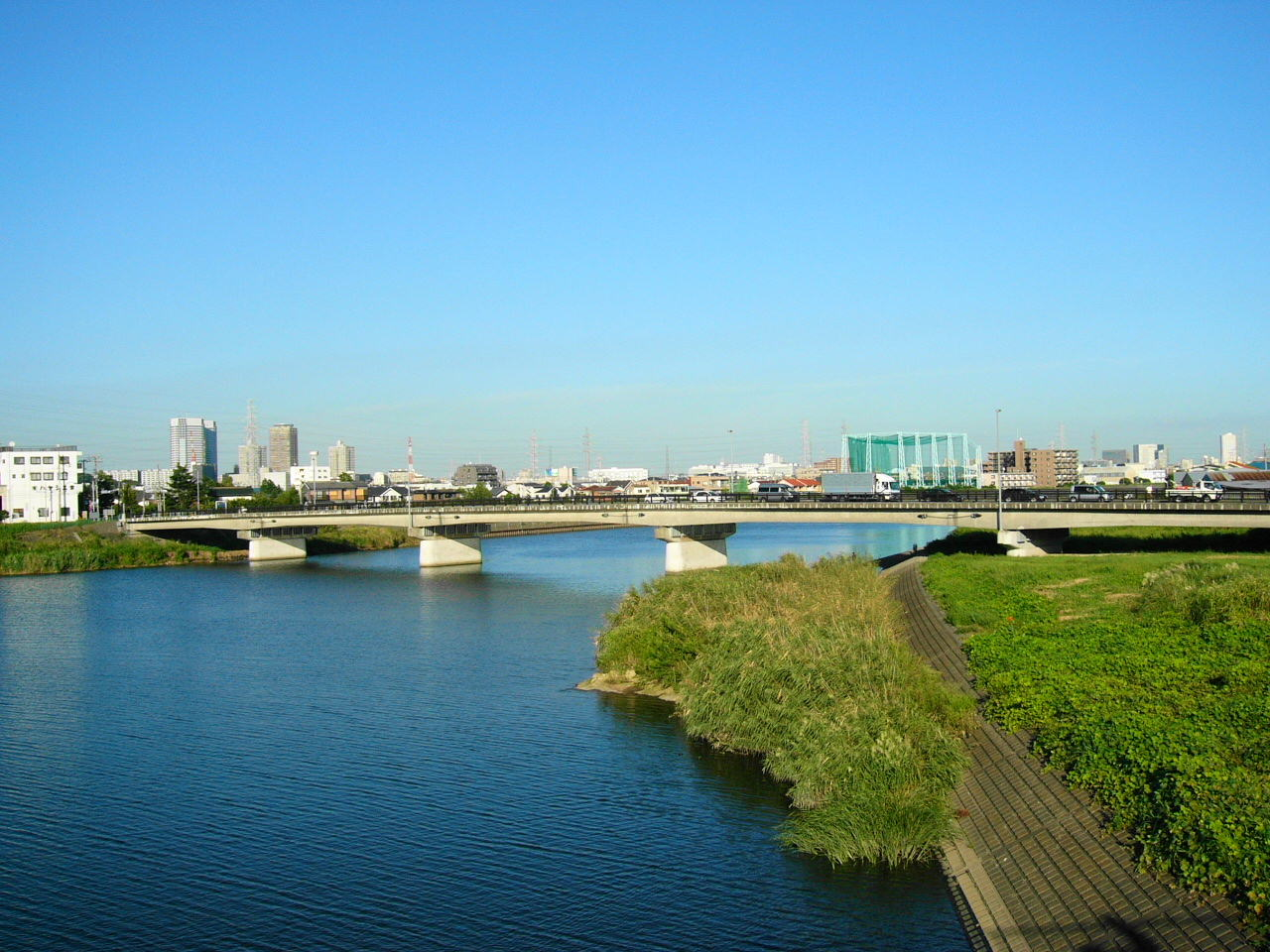 鶴見川に架かる鷹野大橋（写真右は右岸の横浜市鶴見区駒岡、左は左岸の川崎市幸区南加瀬）